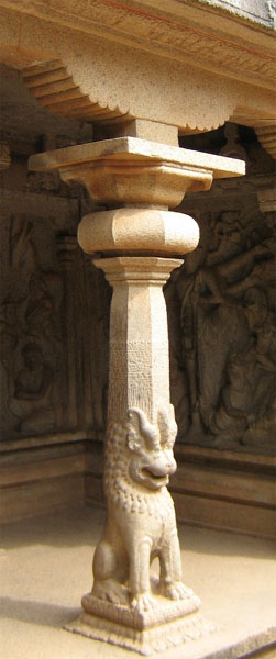 A Lion column in Mamallapuram, Tamil Nadu, India